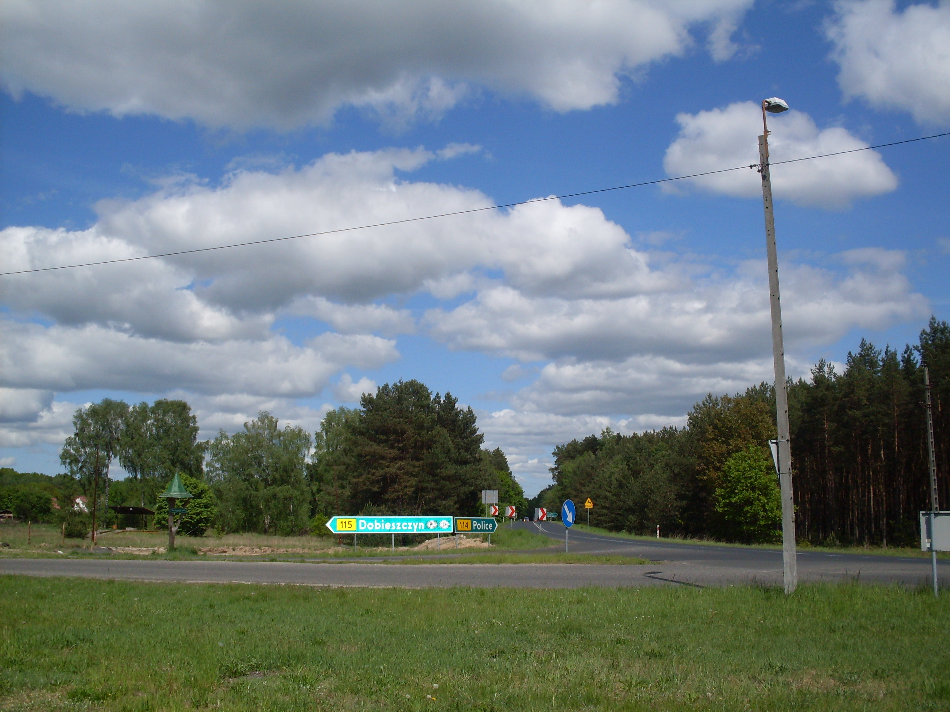 Tanowo - silniční křižovatka nedaleko od hranice s Německem, Polsko